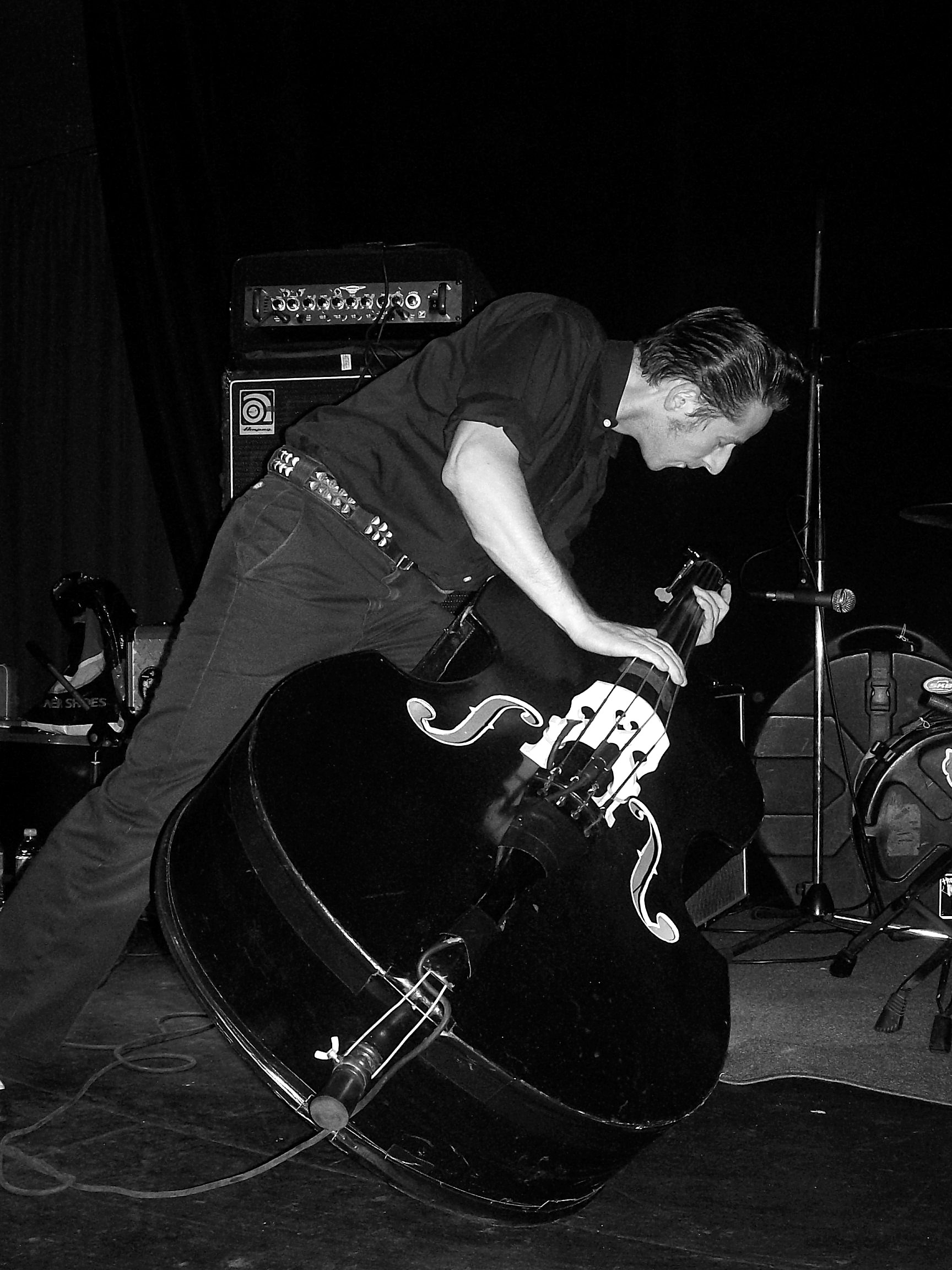 Simon Langhart von The Peacocks im The Plaza in Vancouver, Kanada